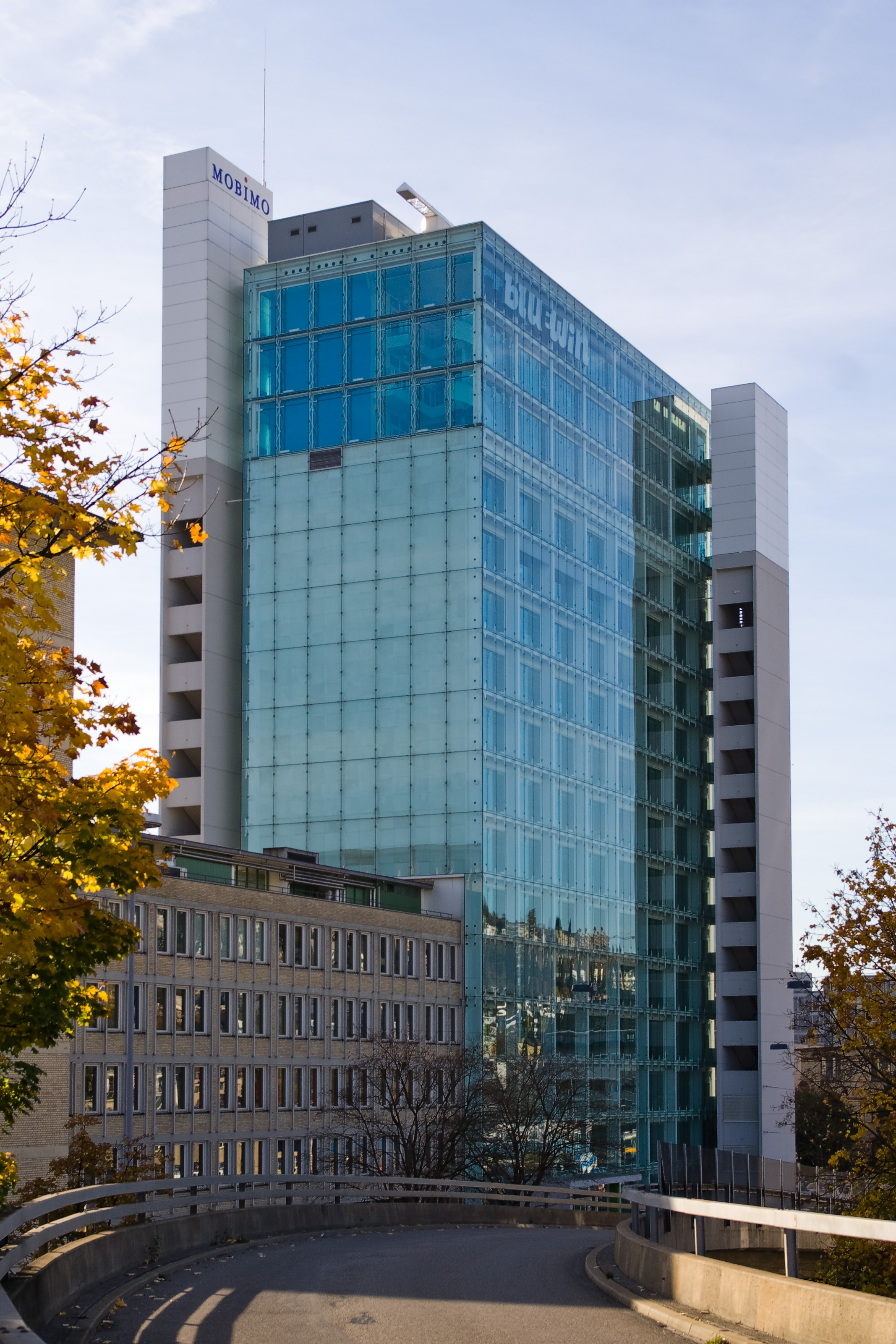 Bluewin-Tower oder Mobimo Hochhaus in Zürich